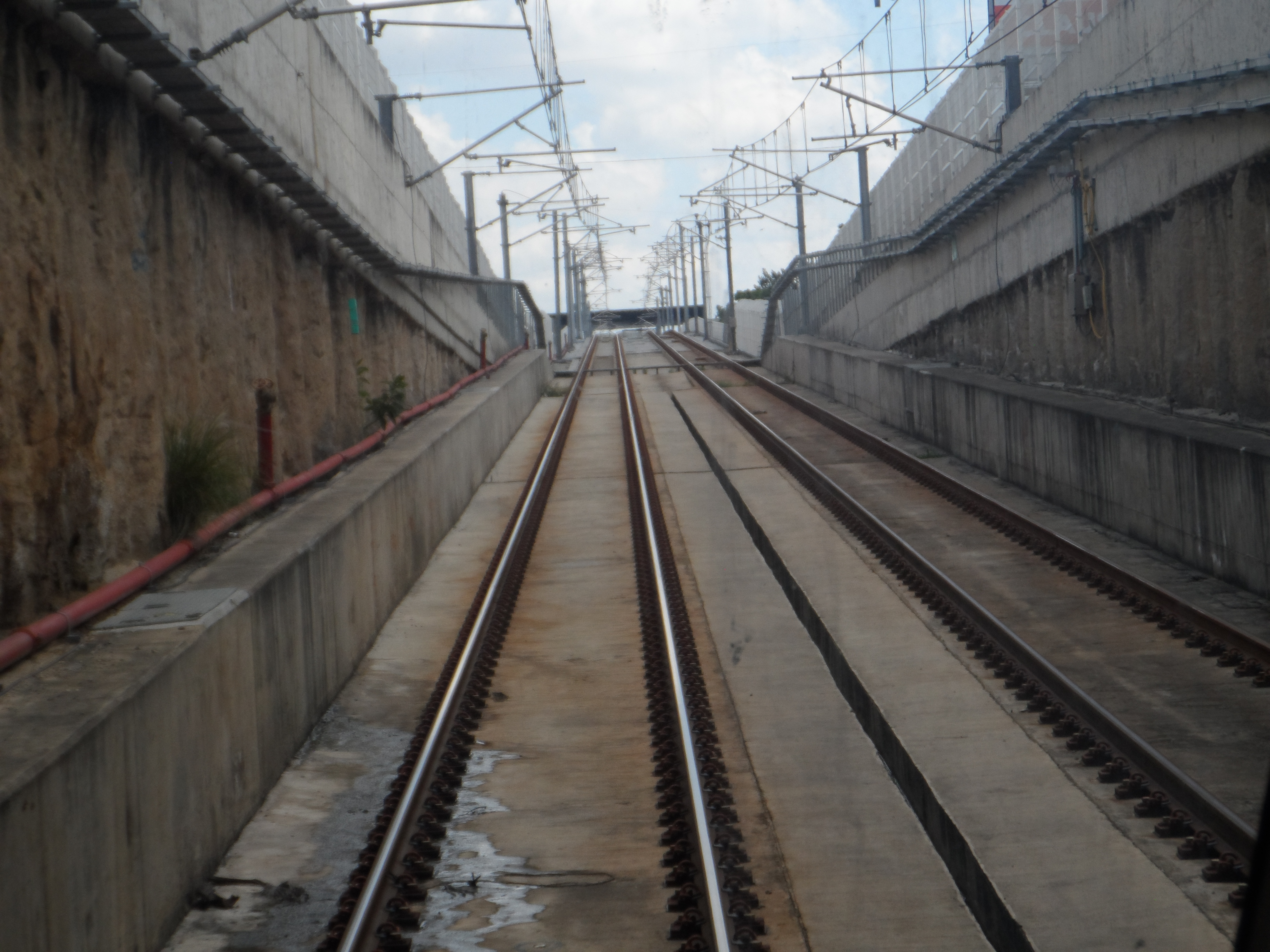 Construcción de la Línea 3 del Tren Ligero de Guadalajara (México): rampa de conexión entre el Viaducto 2 y el Túnel Subterráneo.